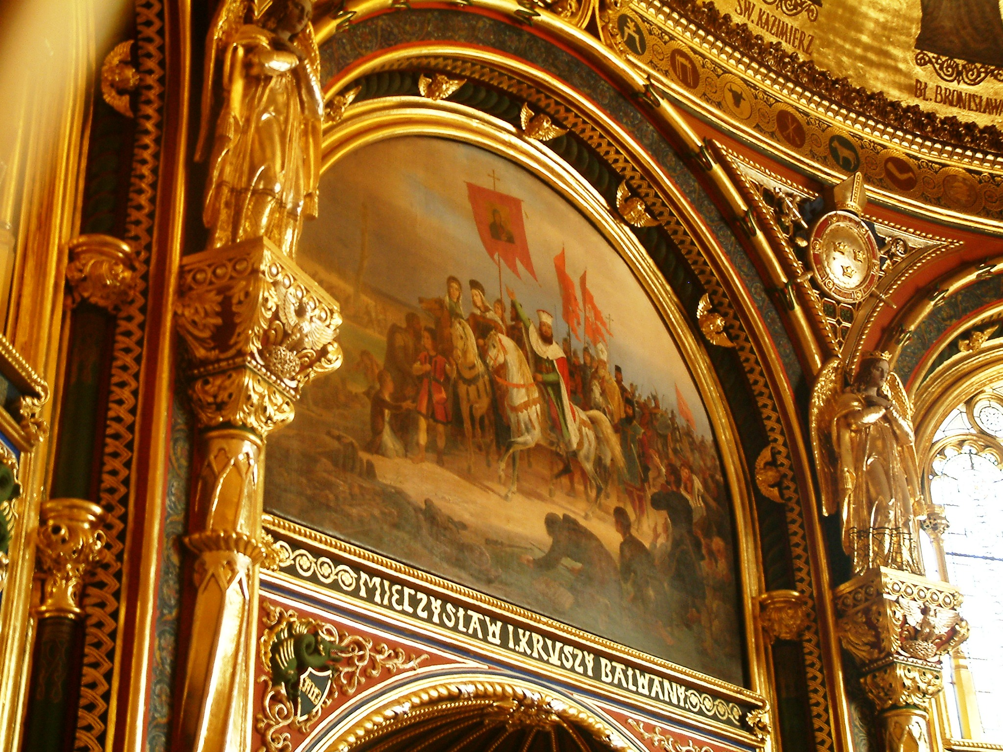 Mieczysław I kruszy bałwany by January Suchodolski in Golden Chapel in Cathedral in Poznań